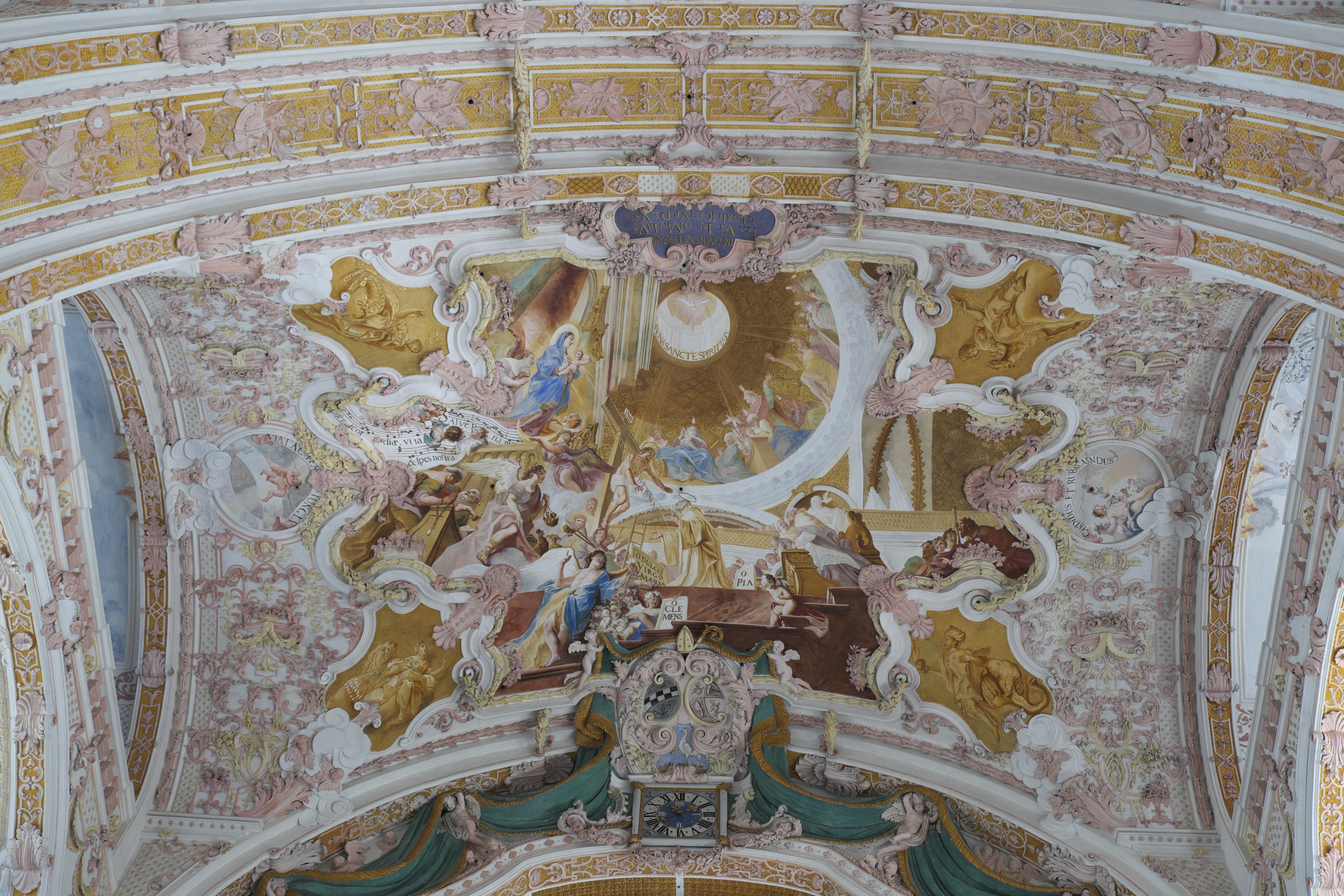 Ehemalige Zisterzienserklosterkirche St. Mariä Himmelfahrt in Fürstenfeldbruck im Landkreis Fürstenfeldbruck (Bayern/Deutschland), Stuckdekor im Chor von Pietro Francesco Appiani, von 1718 bis 1723, im Langhaus von Jacopo Appiani, von 1729 bis 1731; Deckenfresken von Cosmas Damian Asam, im Chor von 1723, im Langhaus von 1731